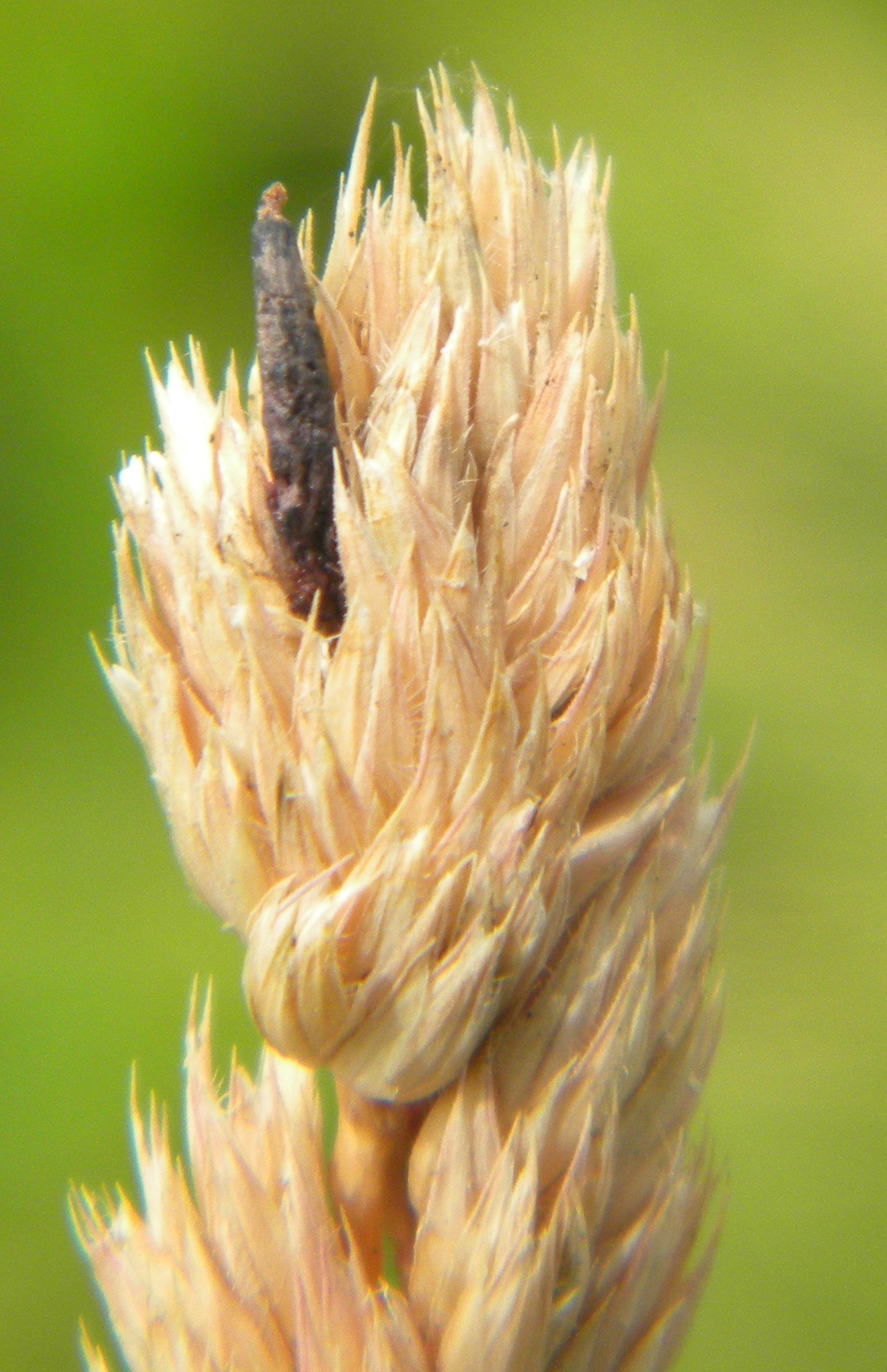 Dactylis glomerata et Claviceps purpurea